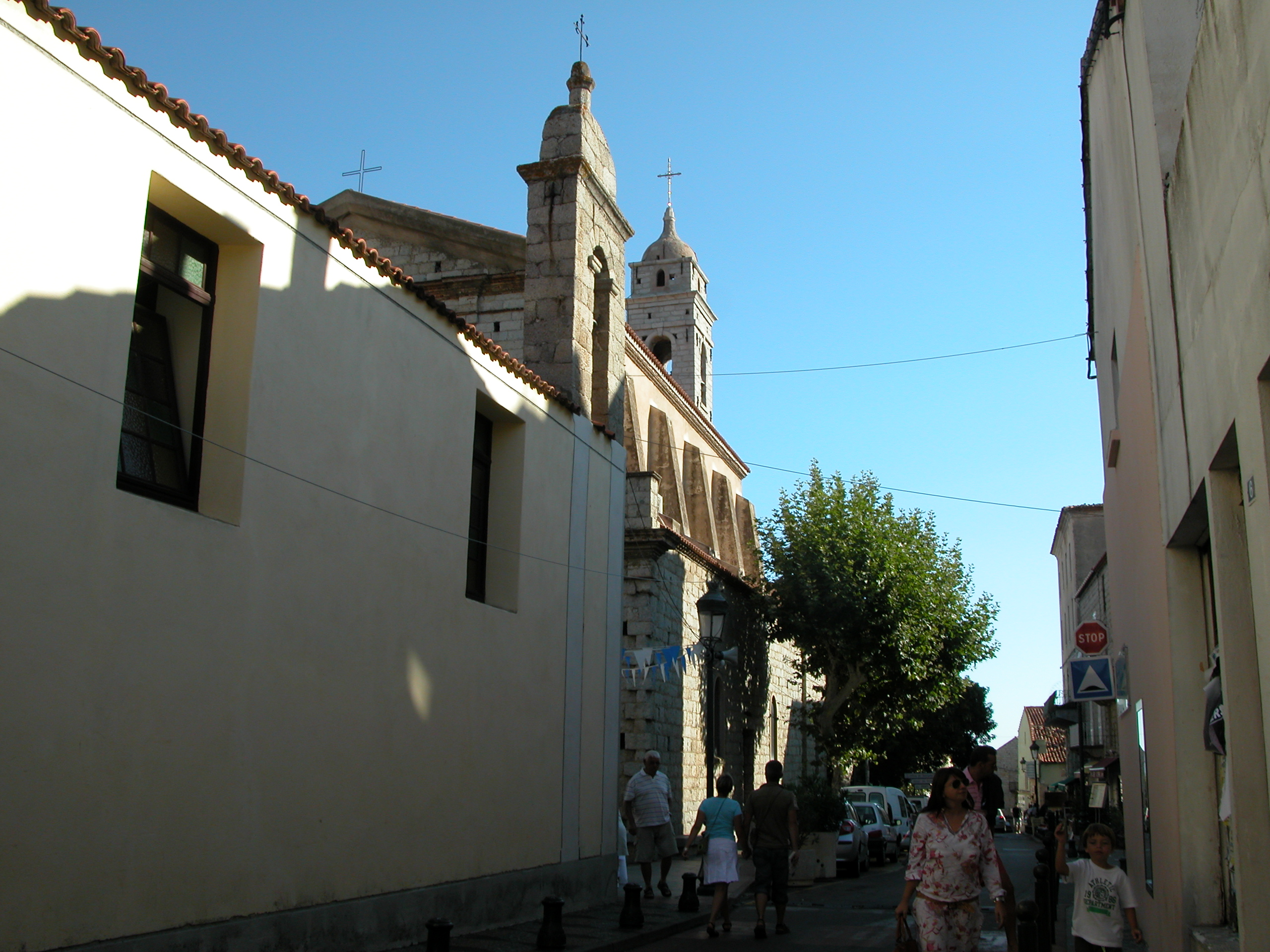 Église Saint-Jean-Baptiste de Porto-Vecchio (Corse-du-Sud).